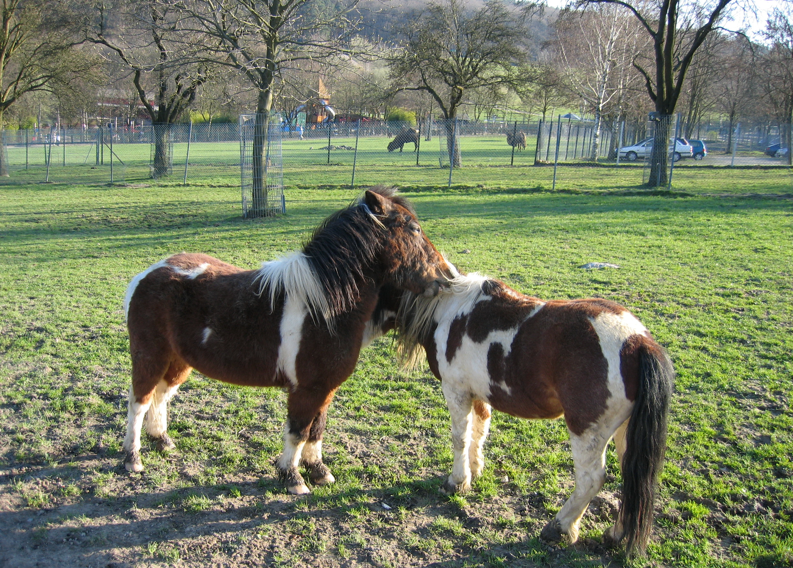 Shetlandponies im vorderen Gehege des Opelzoos - großzügige Freigehege, Hanglage, rechts Teile des Besucherparkplatzes Genehmigung: siehe unten